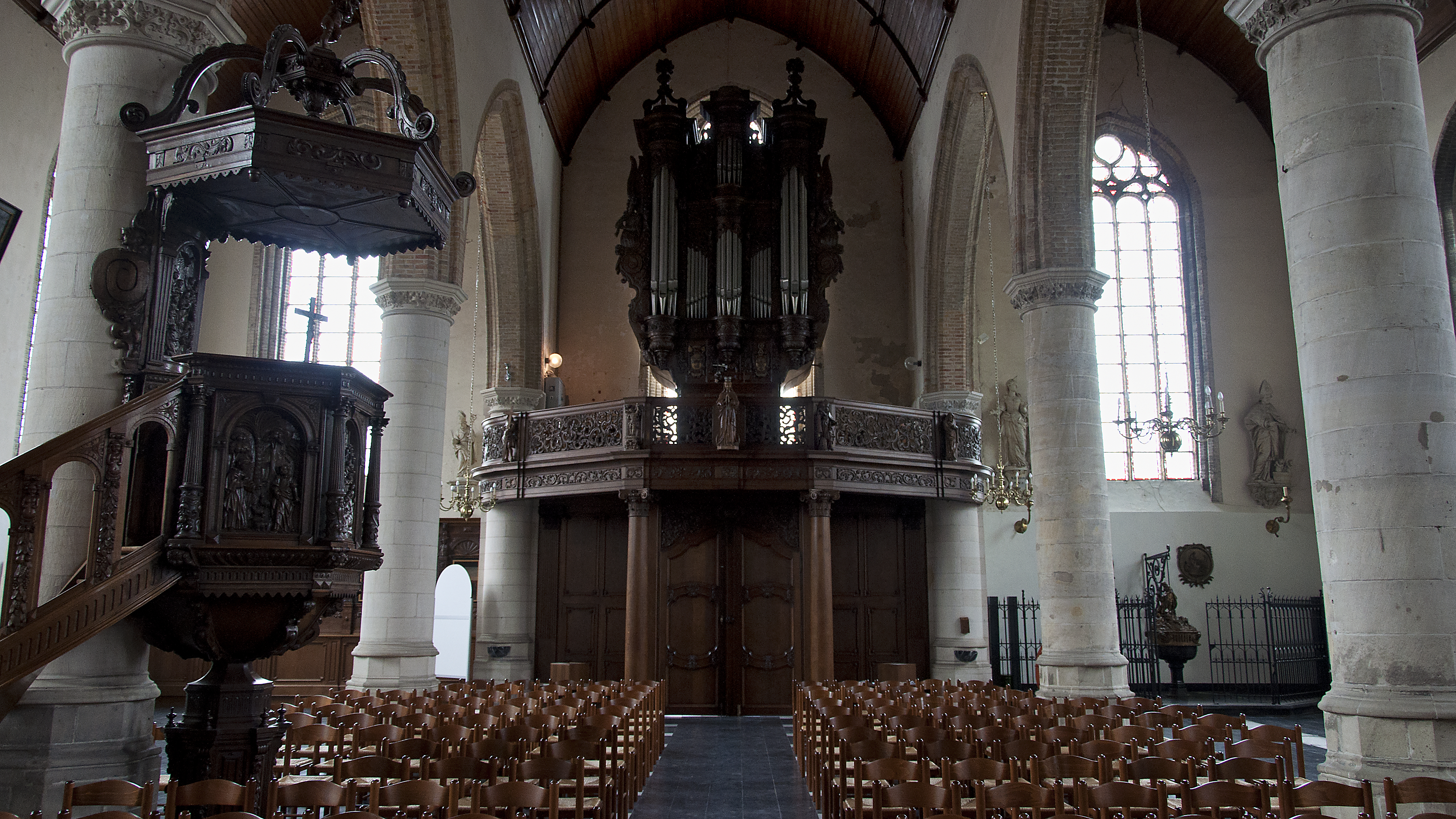 Het orgel en de preekstoel van de Sint-Pietersabdijkerk te Lo, België